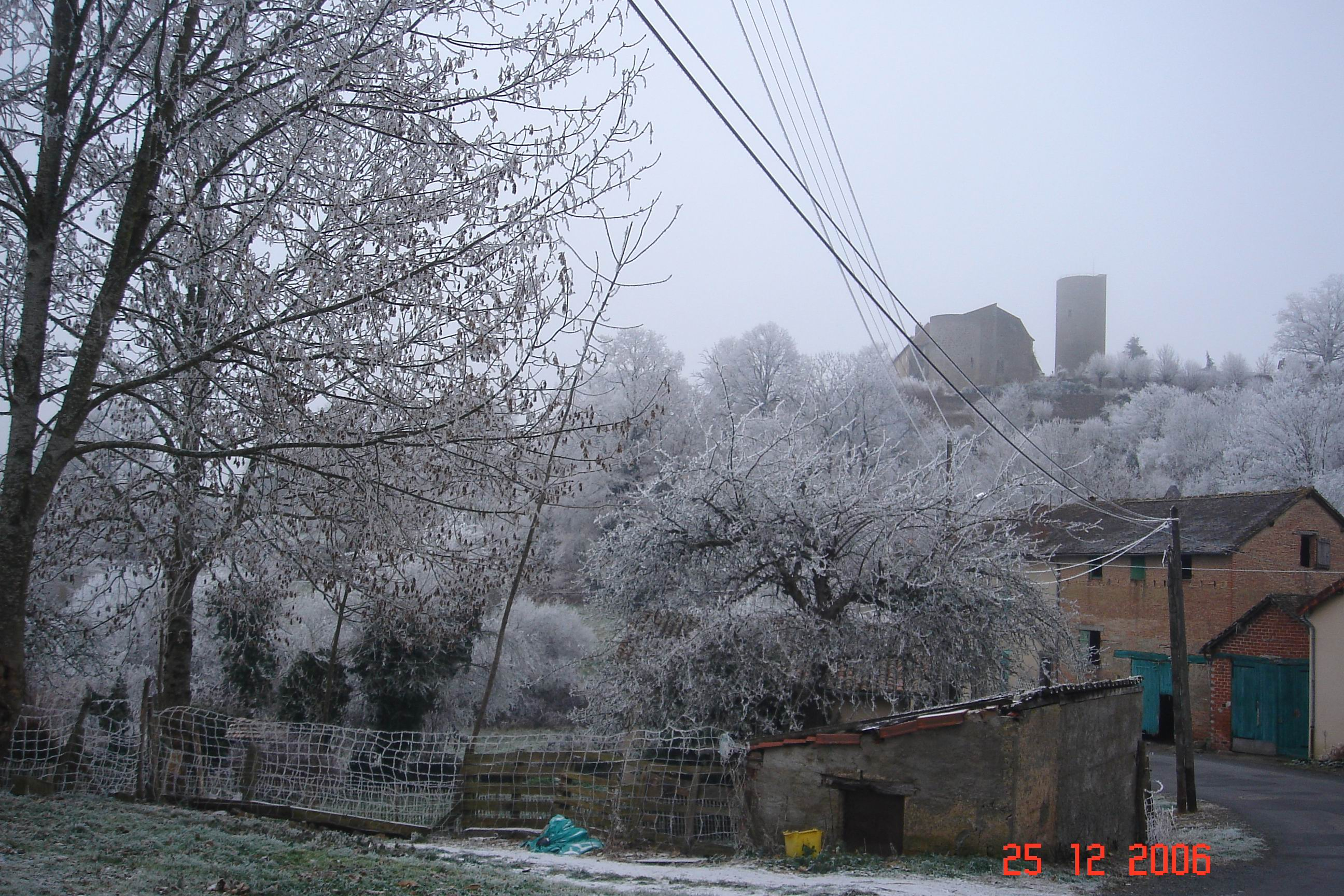 Château de Châlus Chabrol vue de la rue Hallary